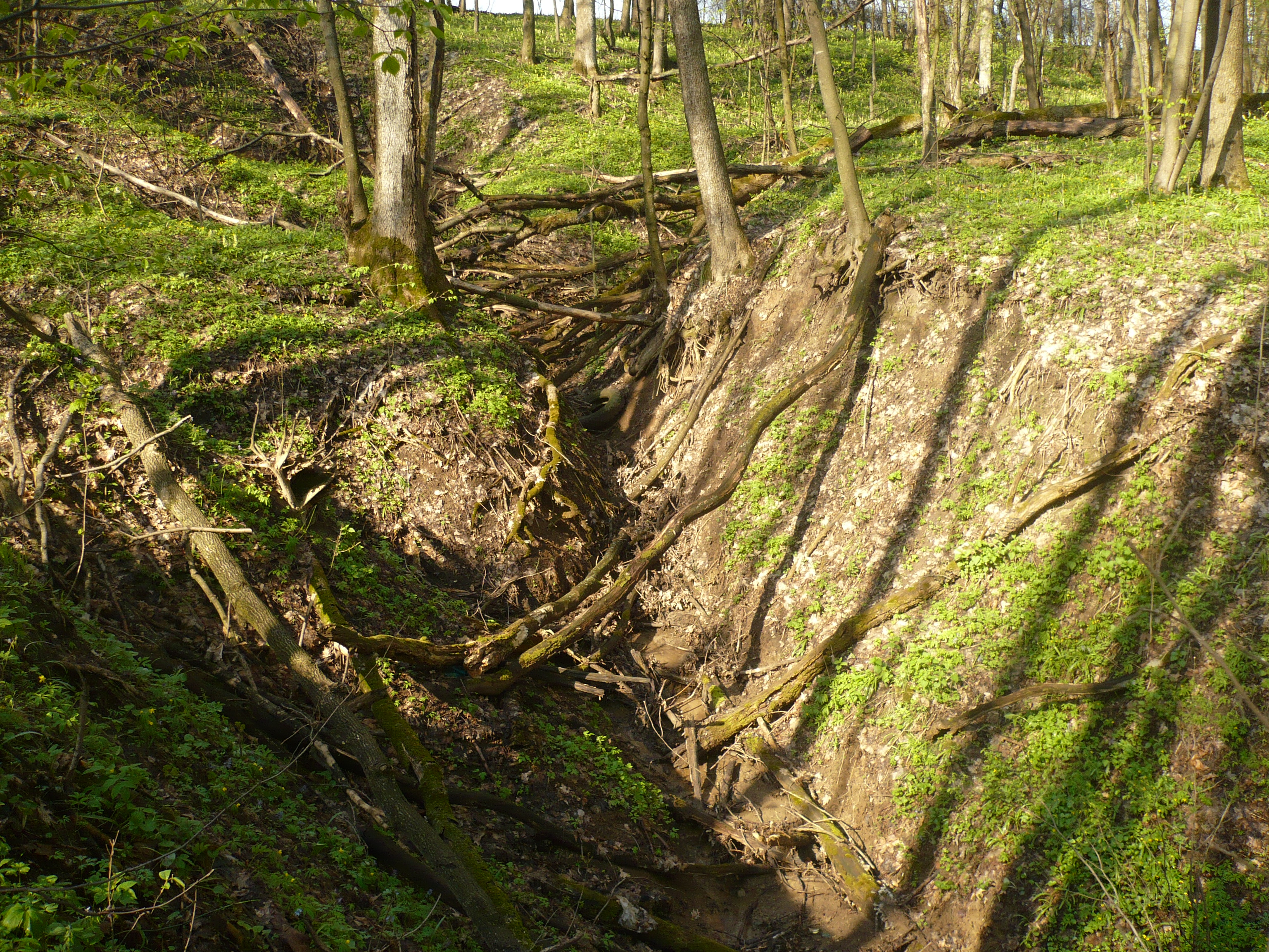 Эрозия в урочище Каменном рядом с родником Паюшки. Шебекинский район Белгородской области. 2011 год